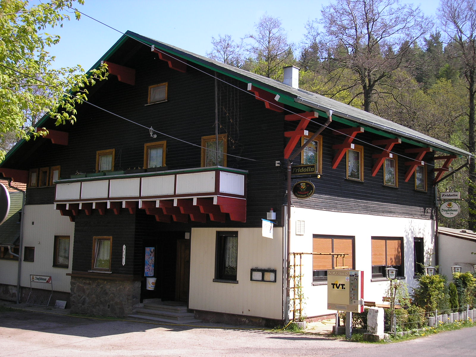 Gaststätte "Fridolin" am Grenzhammer in Ilmenau (Thüringen).